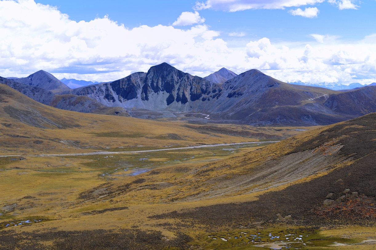 Mi La